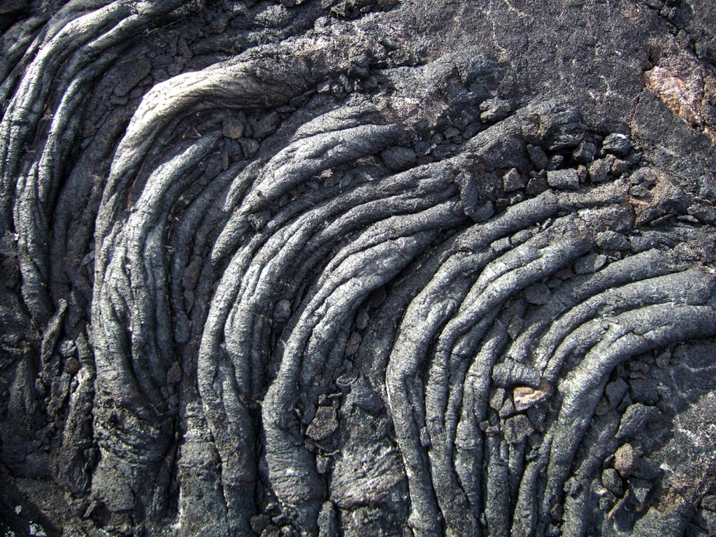 Lava field, La Mancha, La Palma